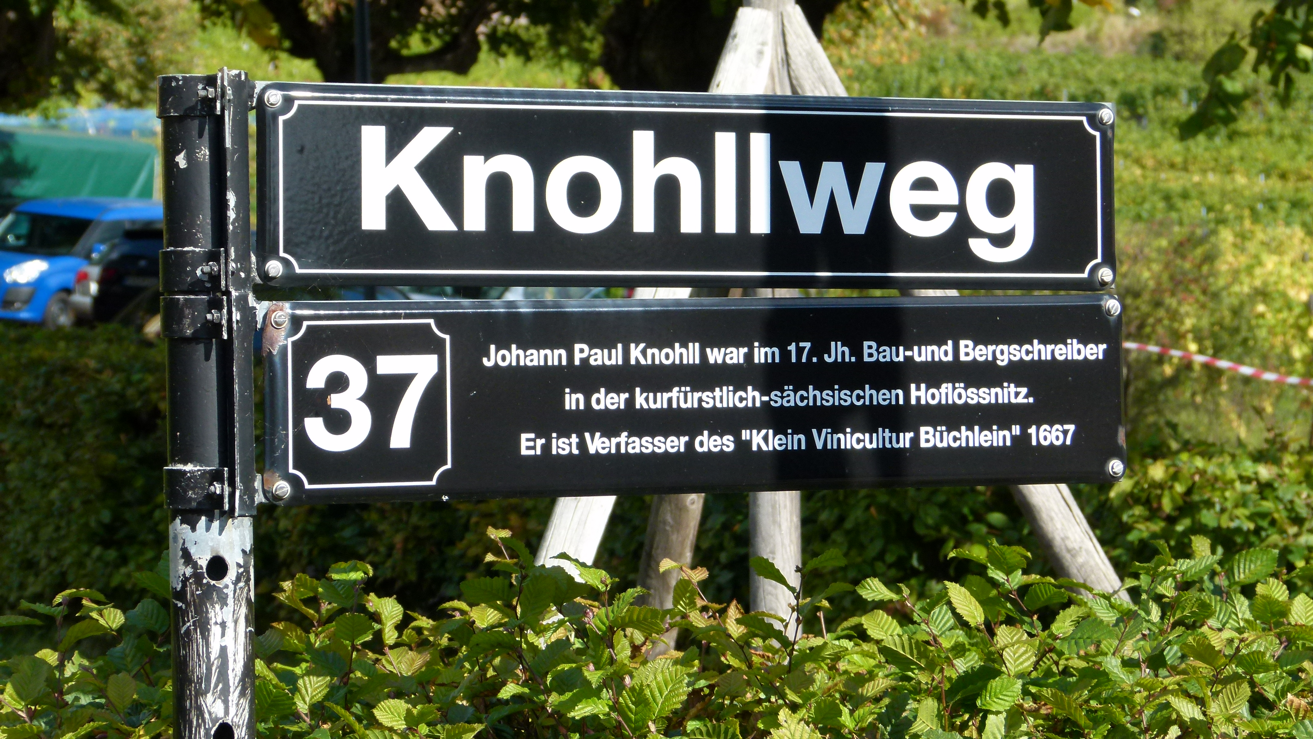 Straßenschild vom Knohllweg - Weingut Hoflößnitz, Radebeul, Sachsen